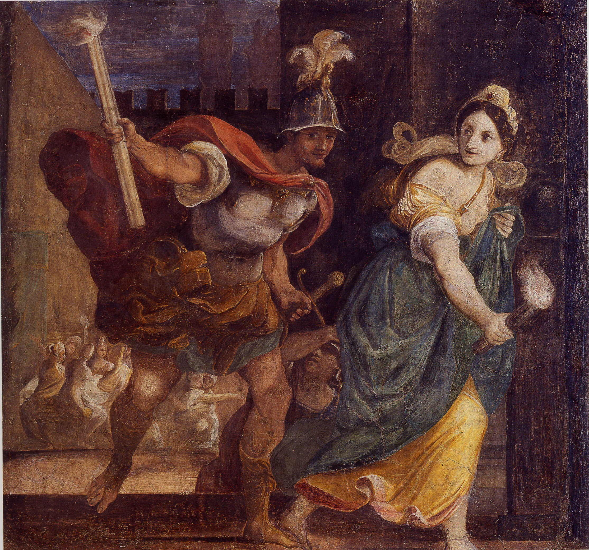 Alessandro e Taide incendiano Persepollabel QS:Lit,"Alessandro e Taide incendiano Persepol"